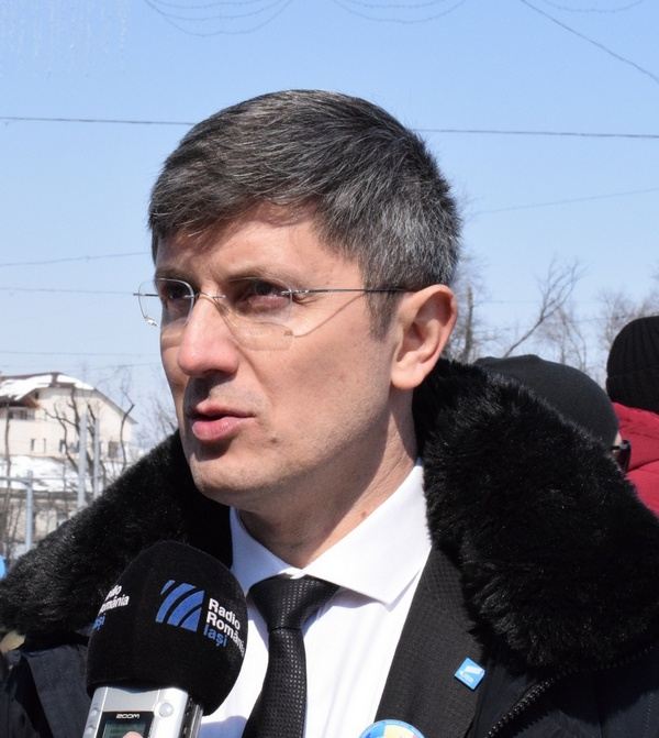 Dan Barna la Marșul Centenar, Chișinău, 25 Martie 2018